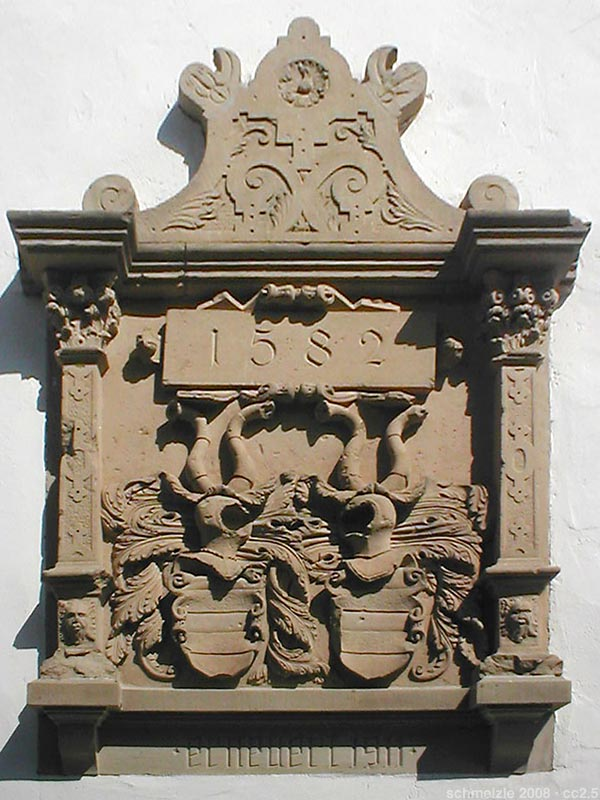 Gemmingensches Wappen an der Kirche in Treschklingen